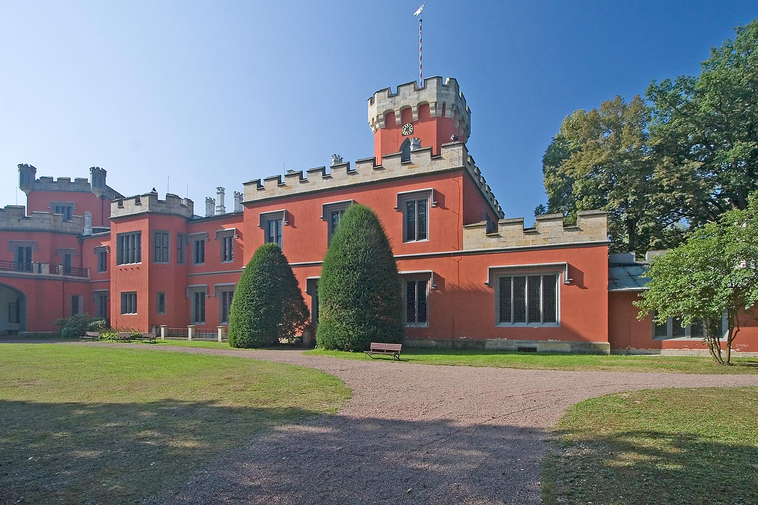 Zámek Hrádek u Nechanic - křídlo se zámeckou kaplí